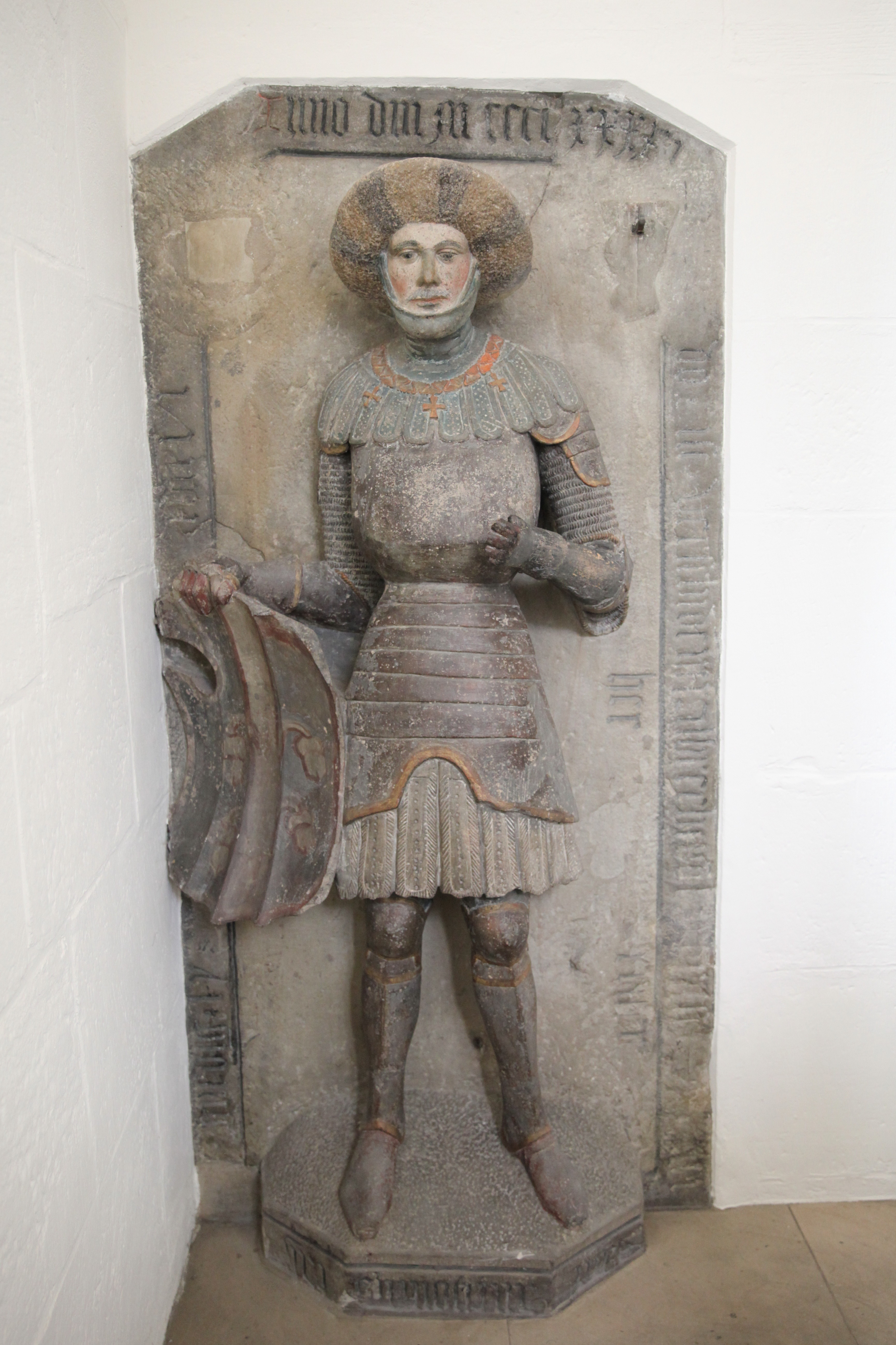 Grabstein des Ritters Albrecht von Bach, Morizkirche Coburg